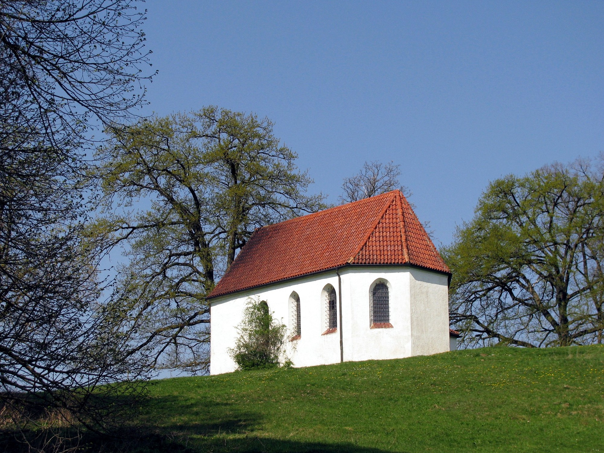 Kapelle St. Koloman bei Reichertshausen, Gemeinde Egling, Oberbayern